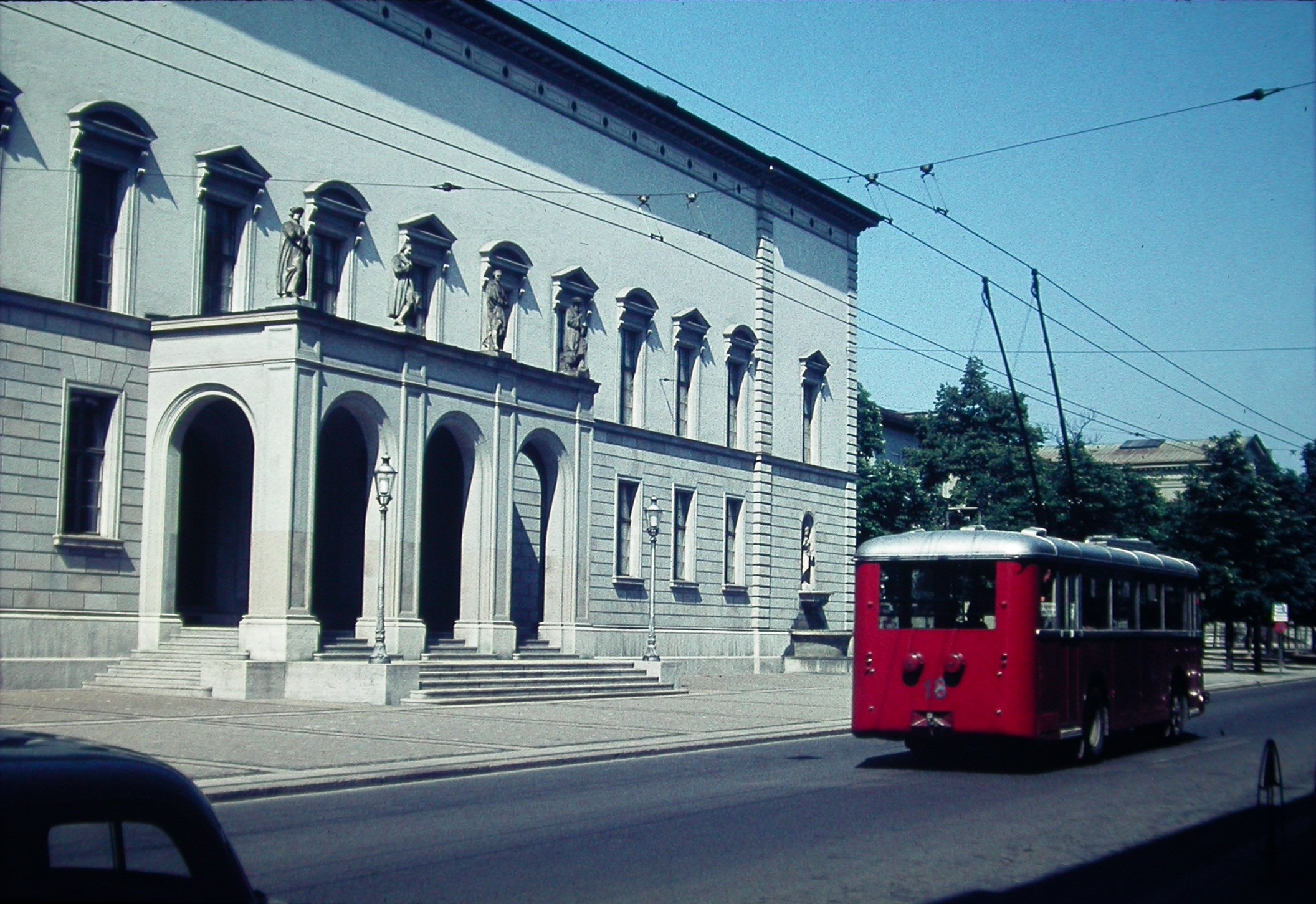 Reinhardmuseum